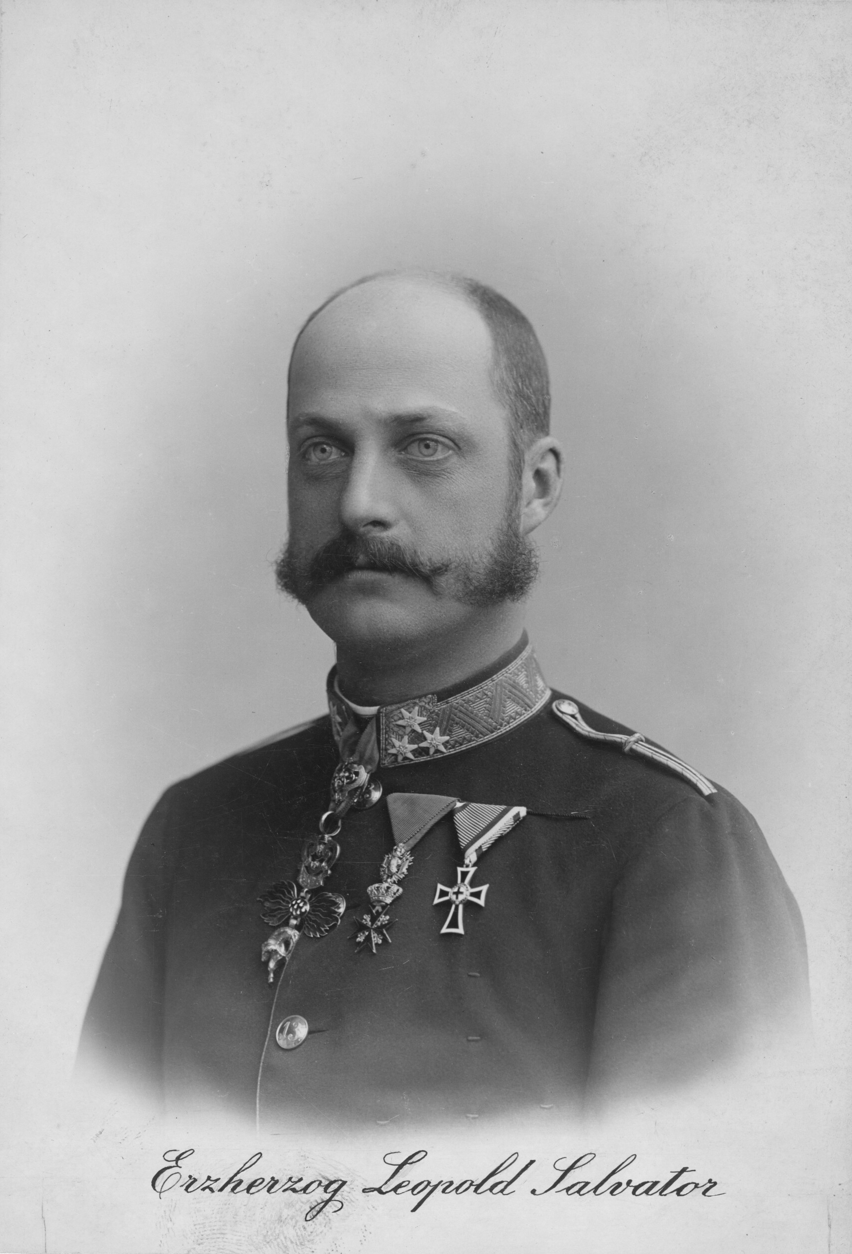 Leopold Salvator, Erzherzog von Österreich-Toskana.